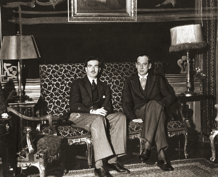 Józef Beck i Anthony Eden (minister spraw zagranicznych W. Brytanii) 2 maja 1935 r., zdjęcie z tygodnika Światowid.